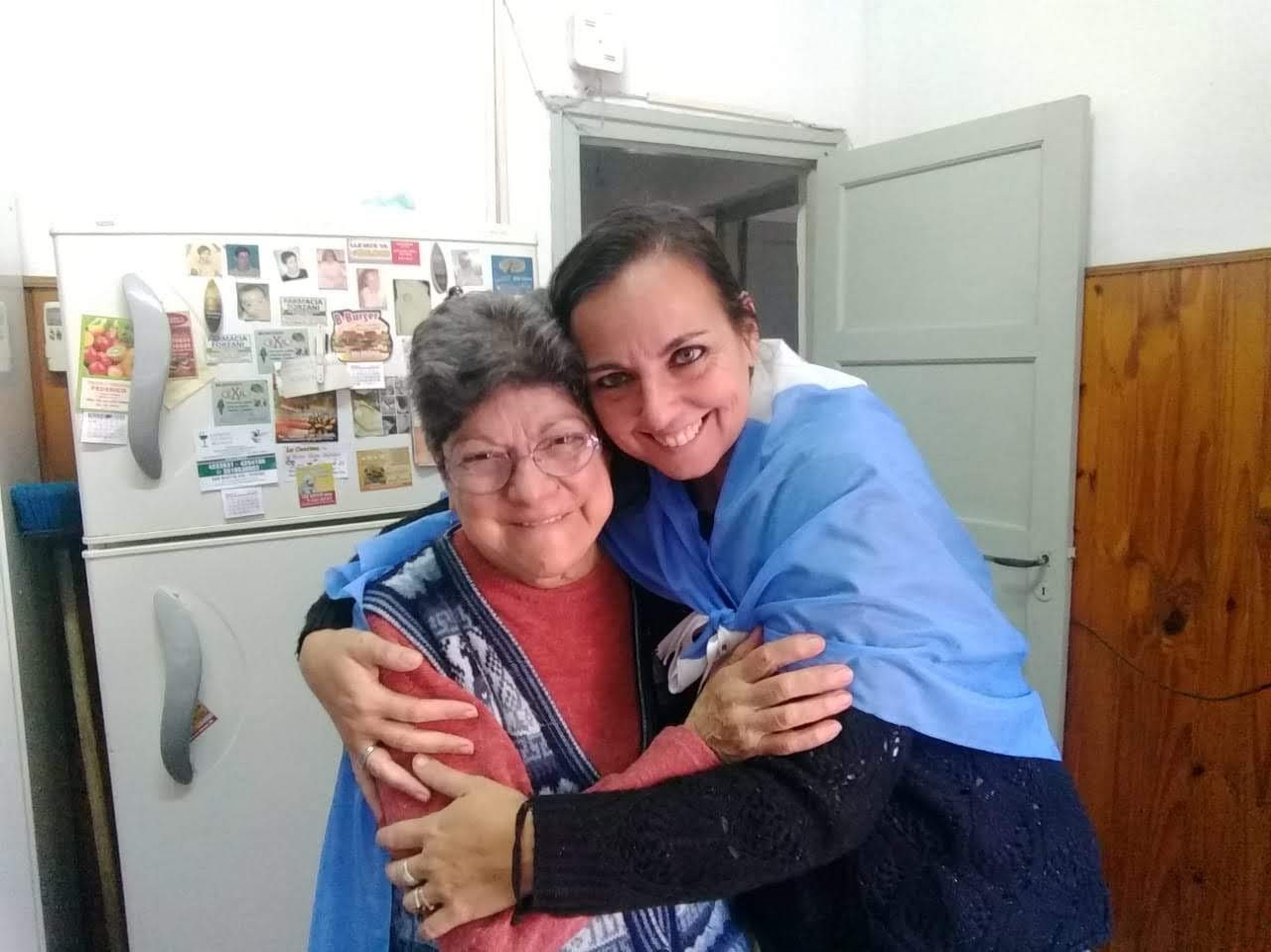 Amor y alegria de una suegra con su hija del corazon, quien luego de la perdida de mi propia mamà, me amò me amò hasta su ùltimo dìa, un 11, de otro mes, del año pasado. This photo has been taken in the country: Argentina